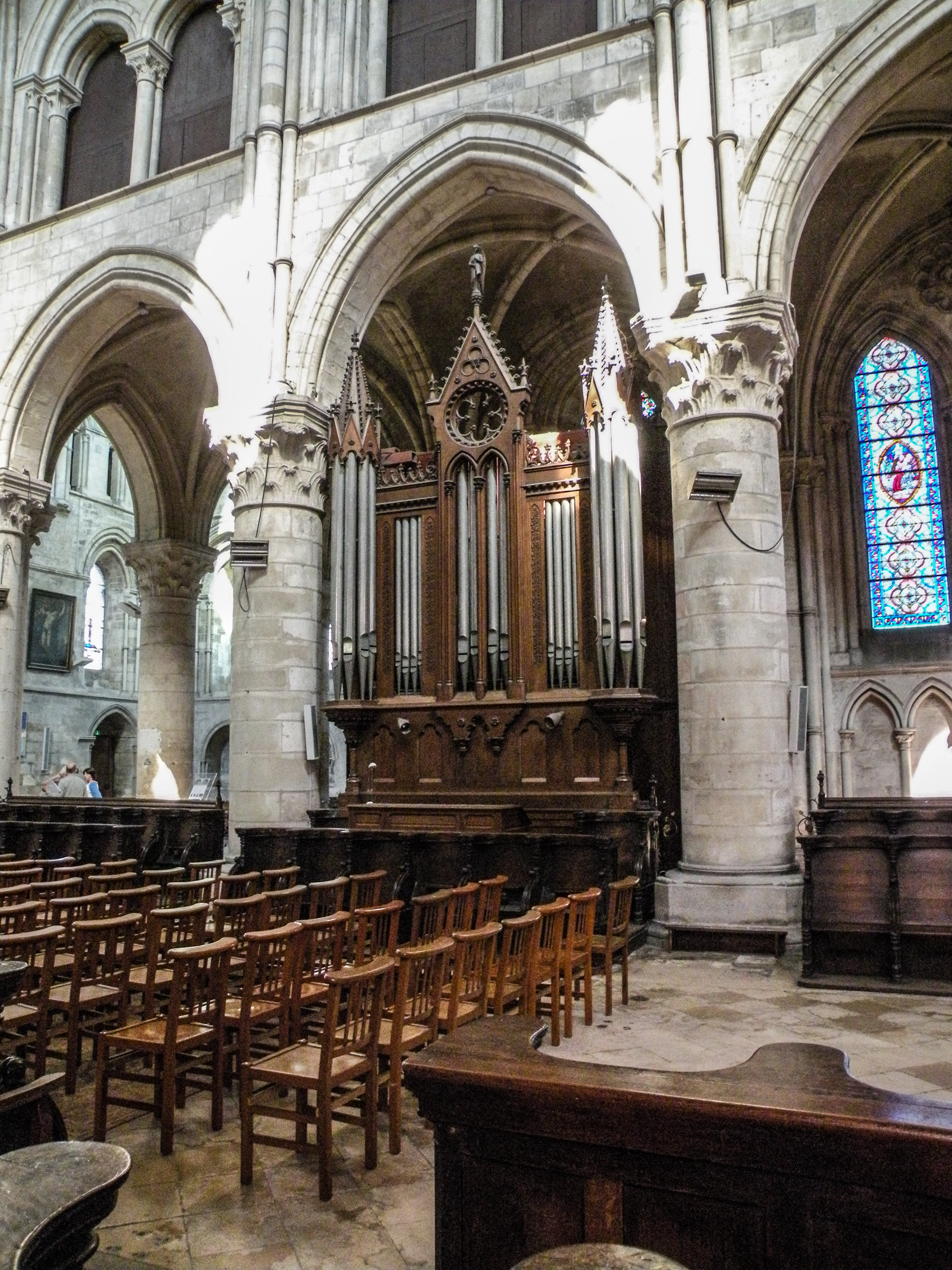 Cathédrale Saint-Pierre de Lisieux, orgue de chœur.